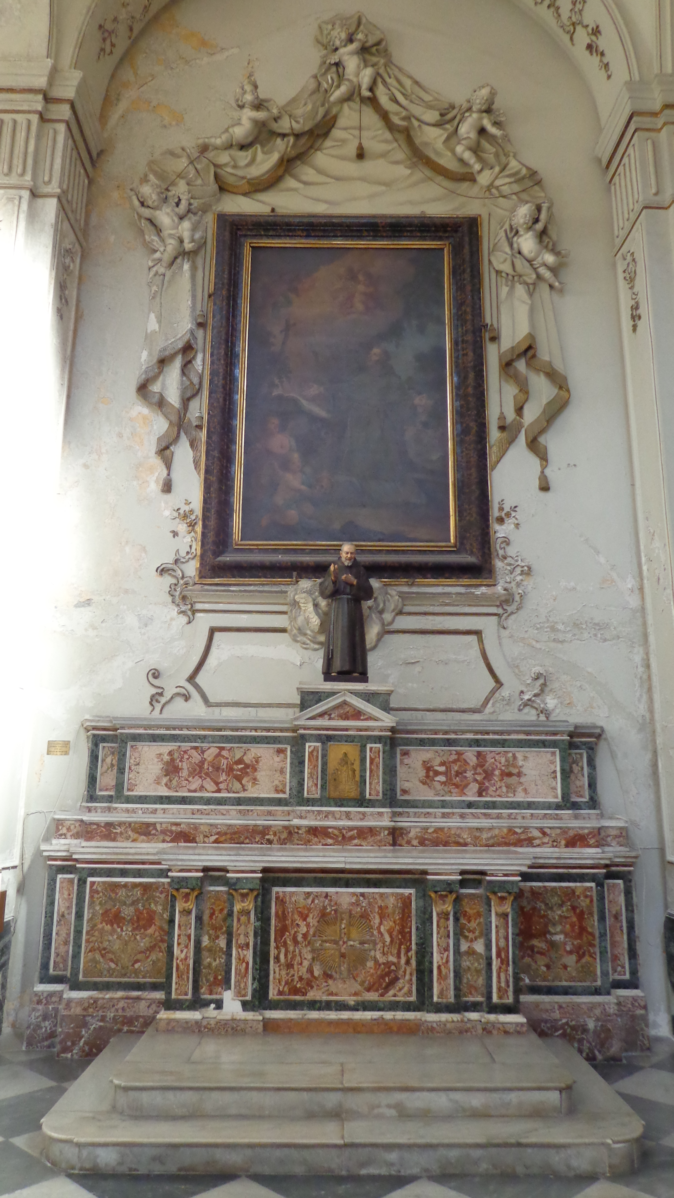 Altare